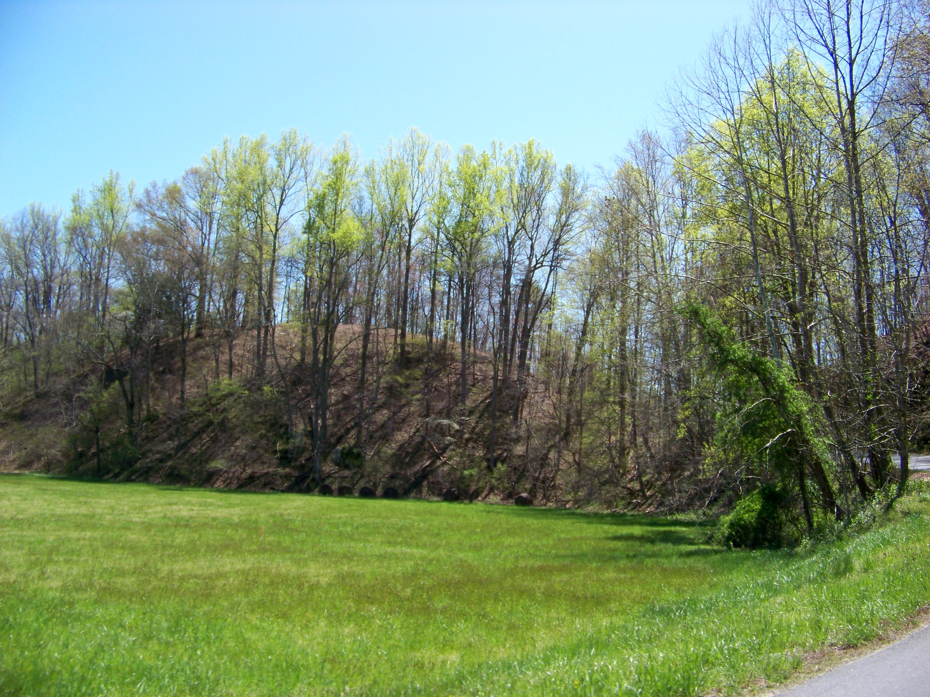 Schuyler, VA, USA